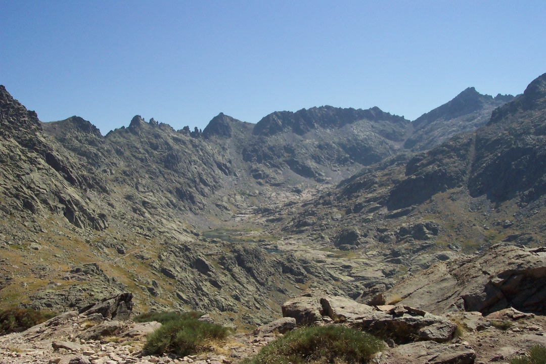 Vista desde la entrada norte del Circo de Gredos. Fotografía realizada por mí en el verano del 2005.